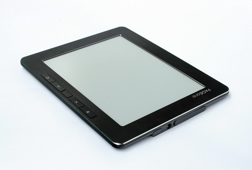 Ридер PAGEone от компании Next Papyrus (Южная Корея).